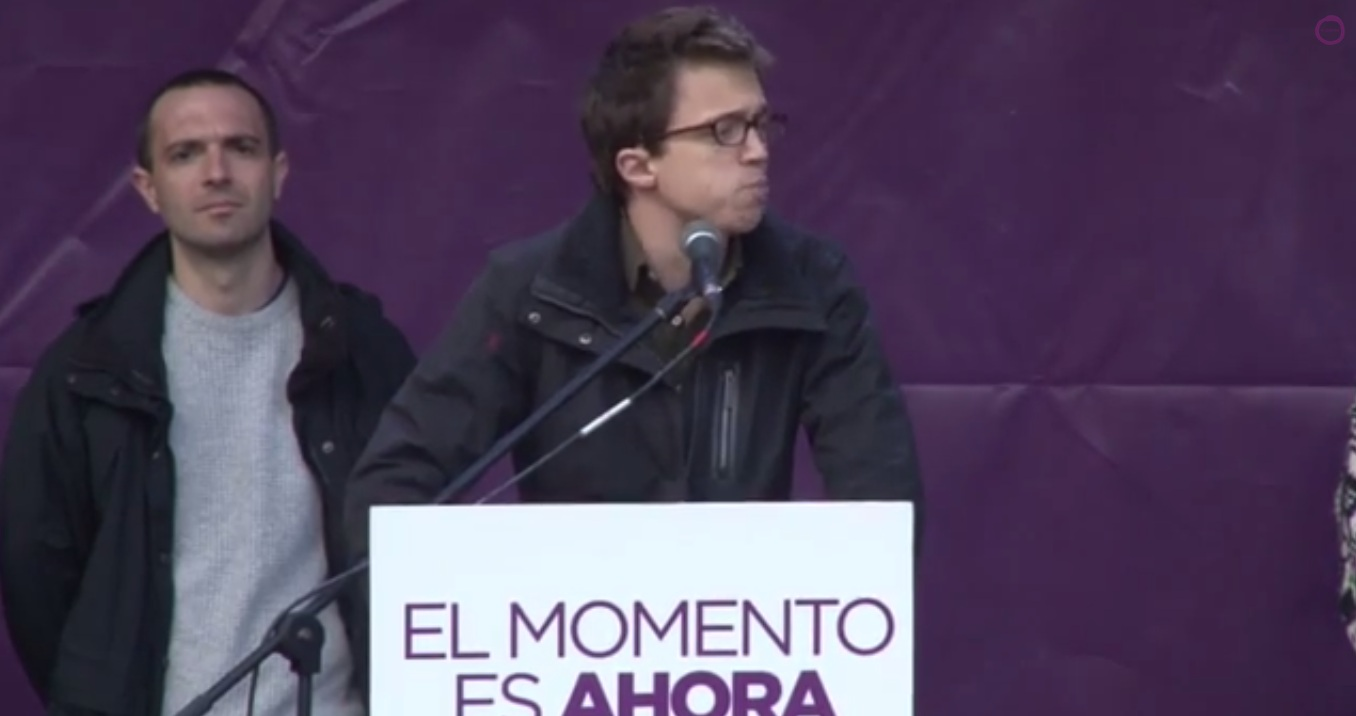 Marcha por el cambio